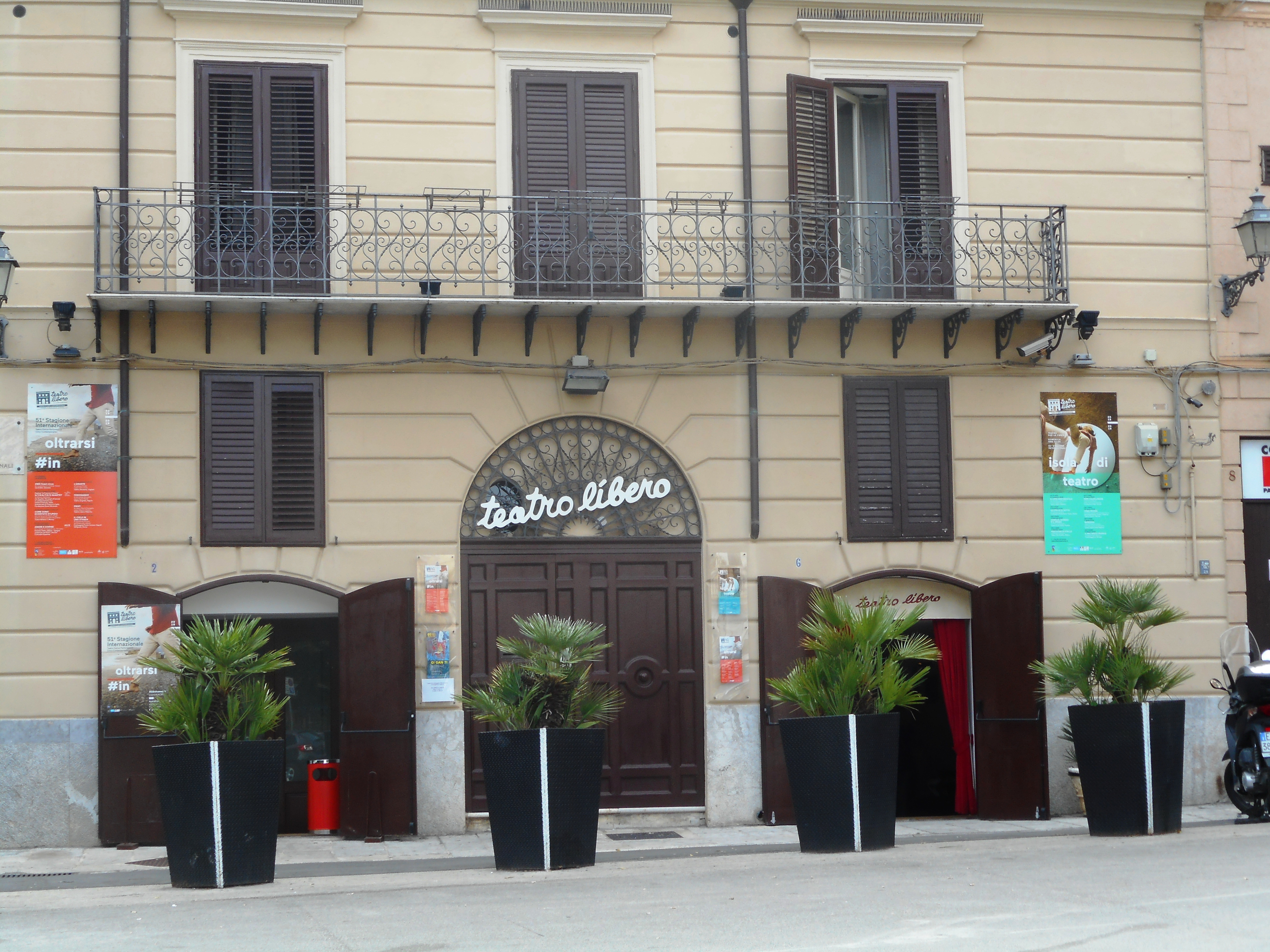 Teatro Libero a Piazza Marina